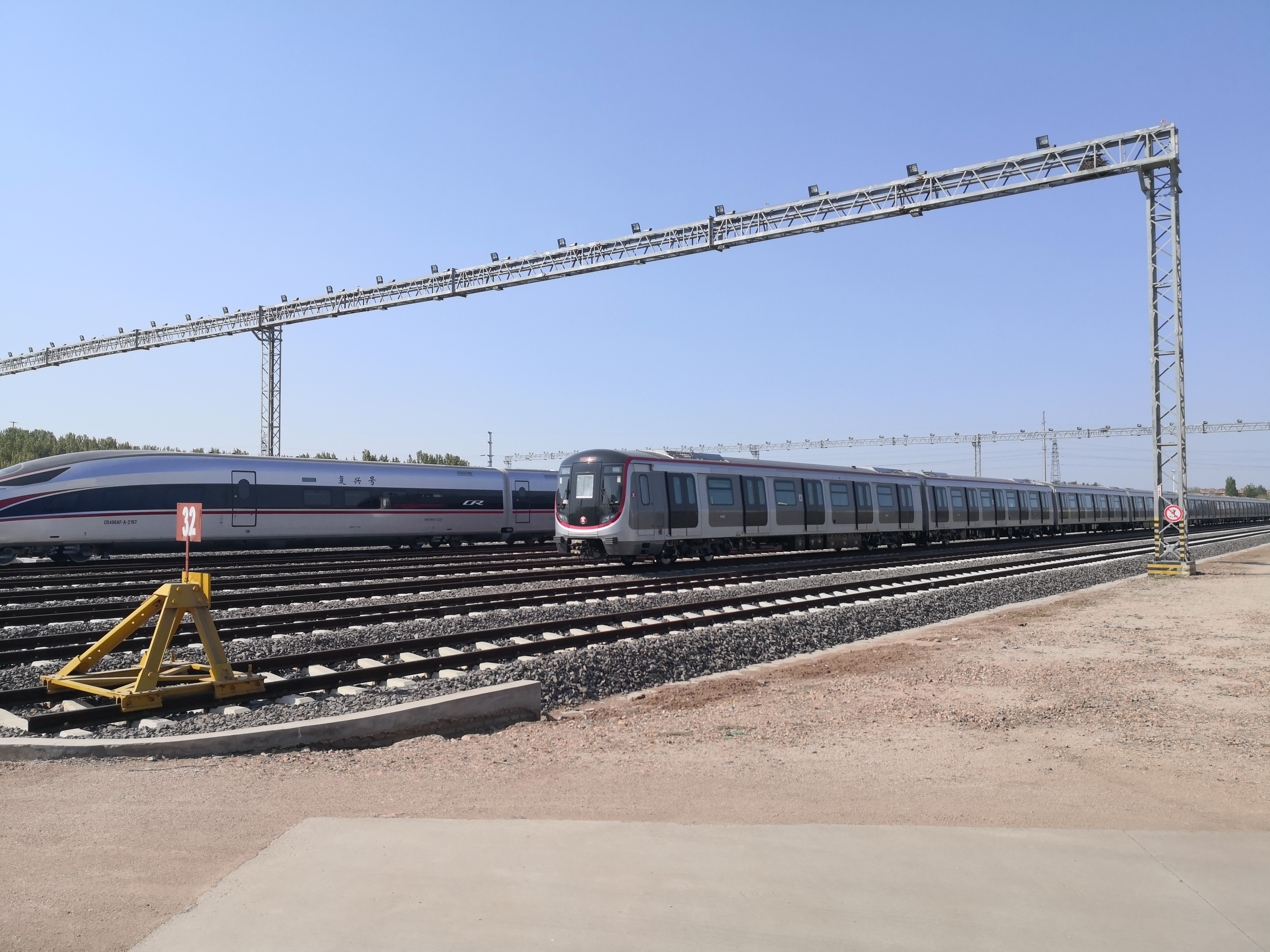 即将交付的港铁市区线愿景列车停放在中车青岛四方机车车辆股份有限公司存车场